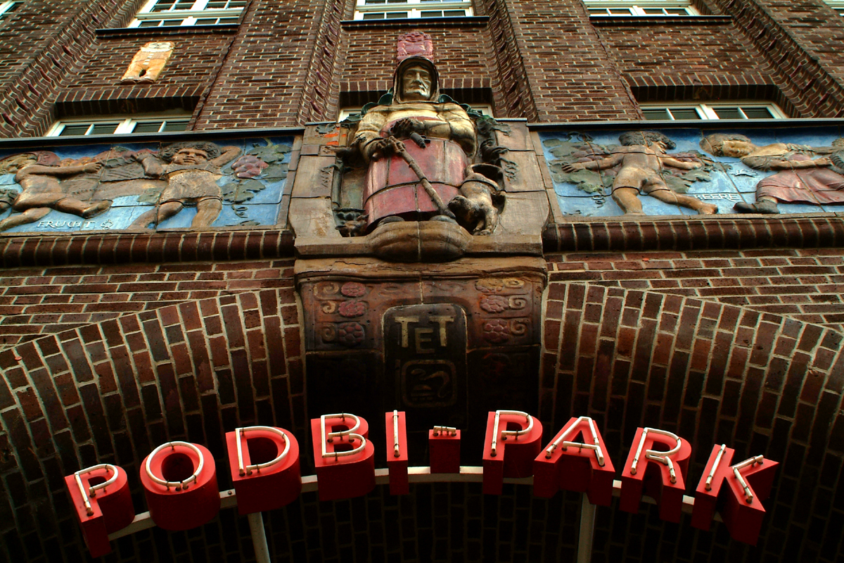 Sie haben ein besseres Bild? Sogar ein historisches Dokument als Bild(ungsförderung)? Zeigen Sie' s uns. Stiften Sie es, allen Menschen.